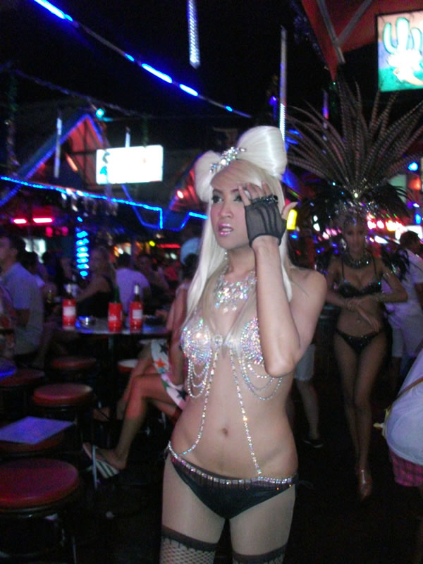 Tayland Kathoey Ladyboy